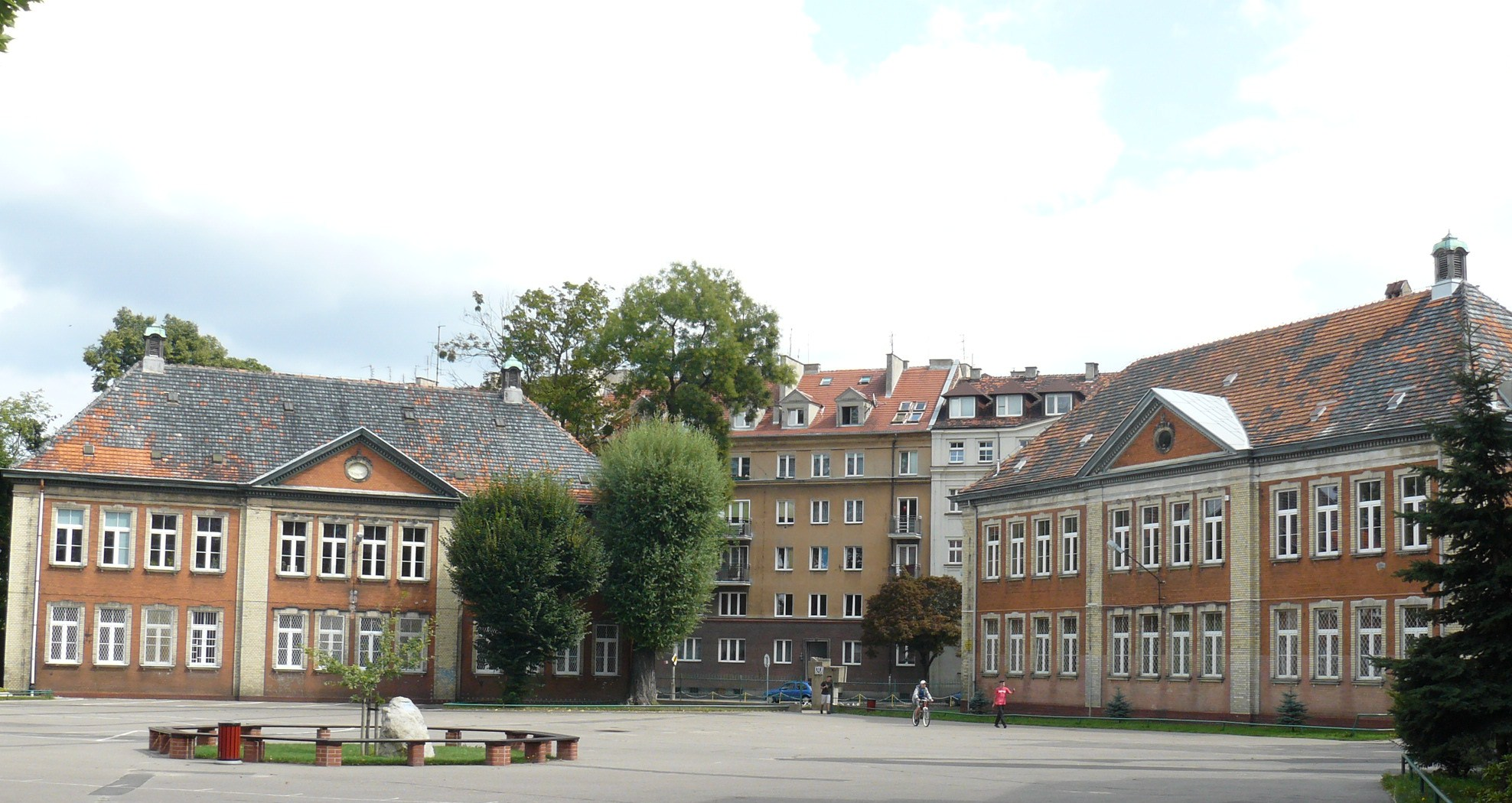 Poznań Łazarz - zespół zabudowań szkolnych (zabytek nr A 258).